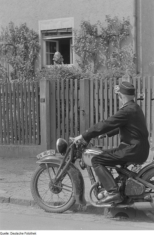 Original image description from the Deutsche Fotothek Portrait eines Polizisten auf Krad (im Range eines Hauptwachtmeisters?)